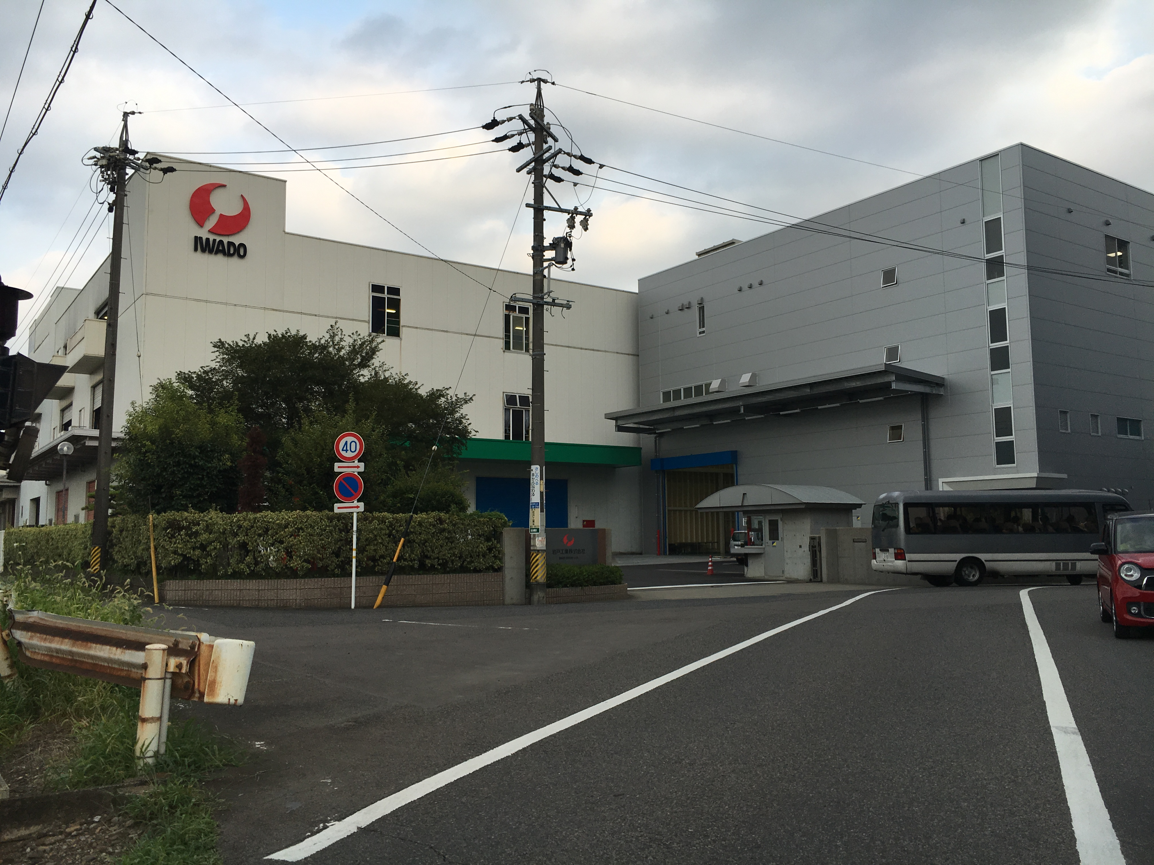 岐阜県各務原市鵜沼川崎町の岩戸工業 社屋・工場外観